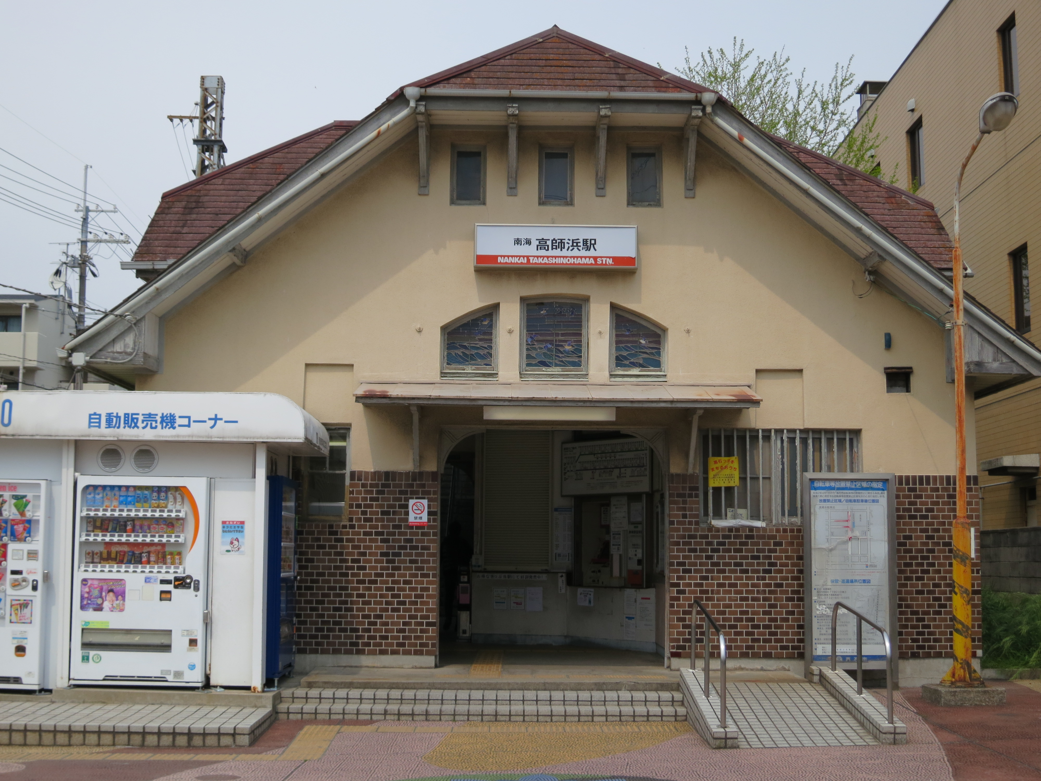 南海高師浜駅 Canon PowerShot S100